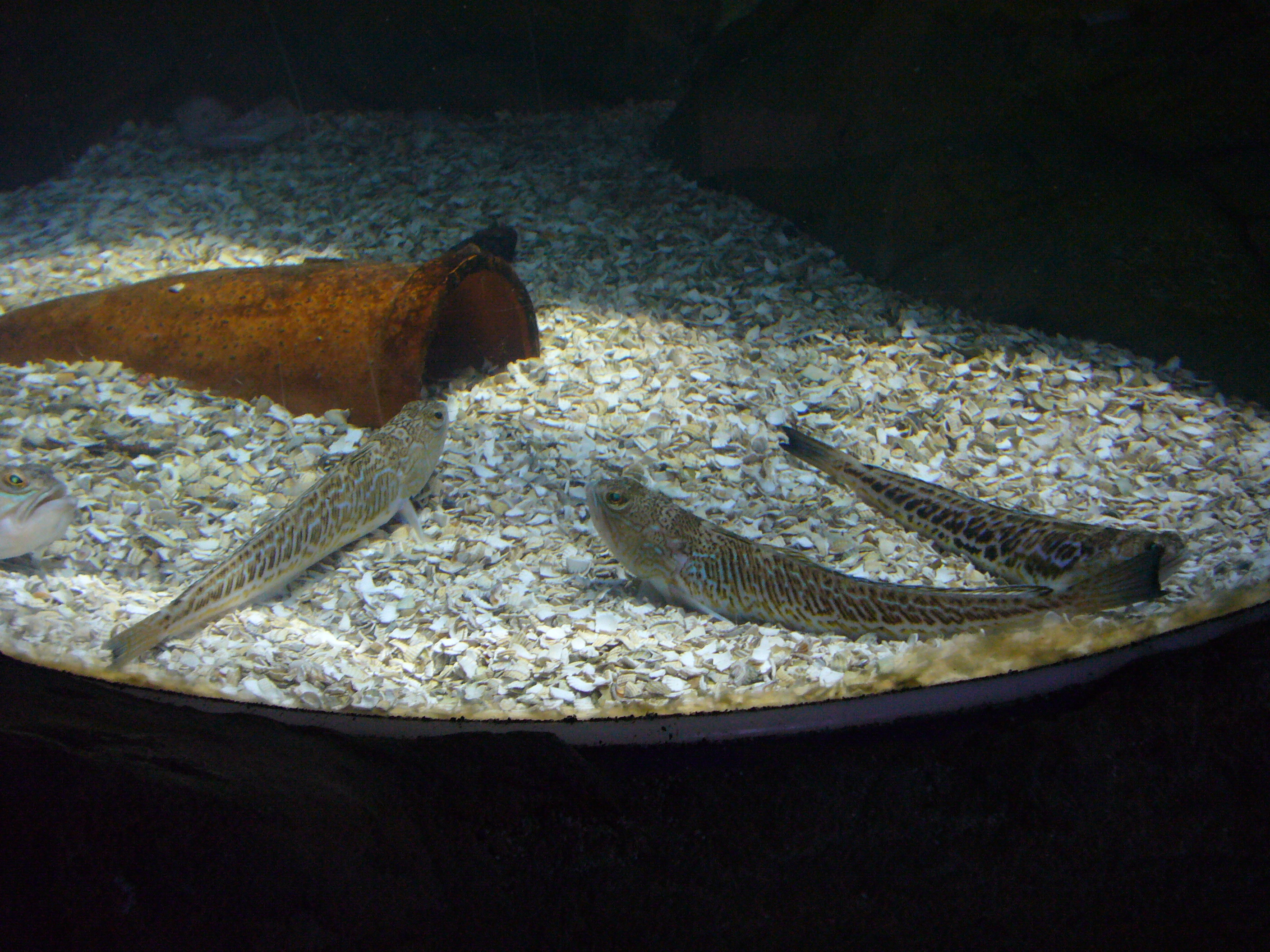 Trachinus draco (Großes Petermännchen)